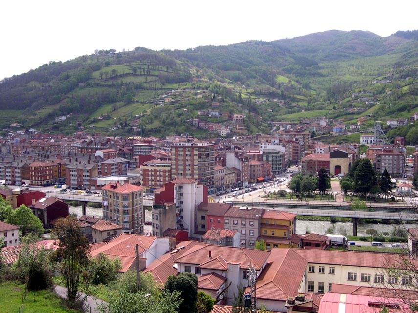 L'Entregu vistu dende L'acebal